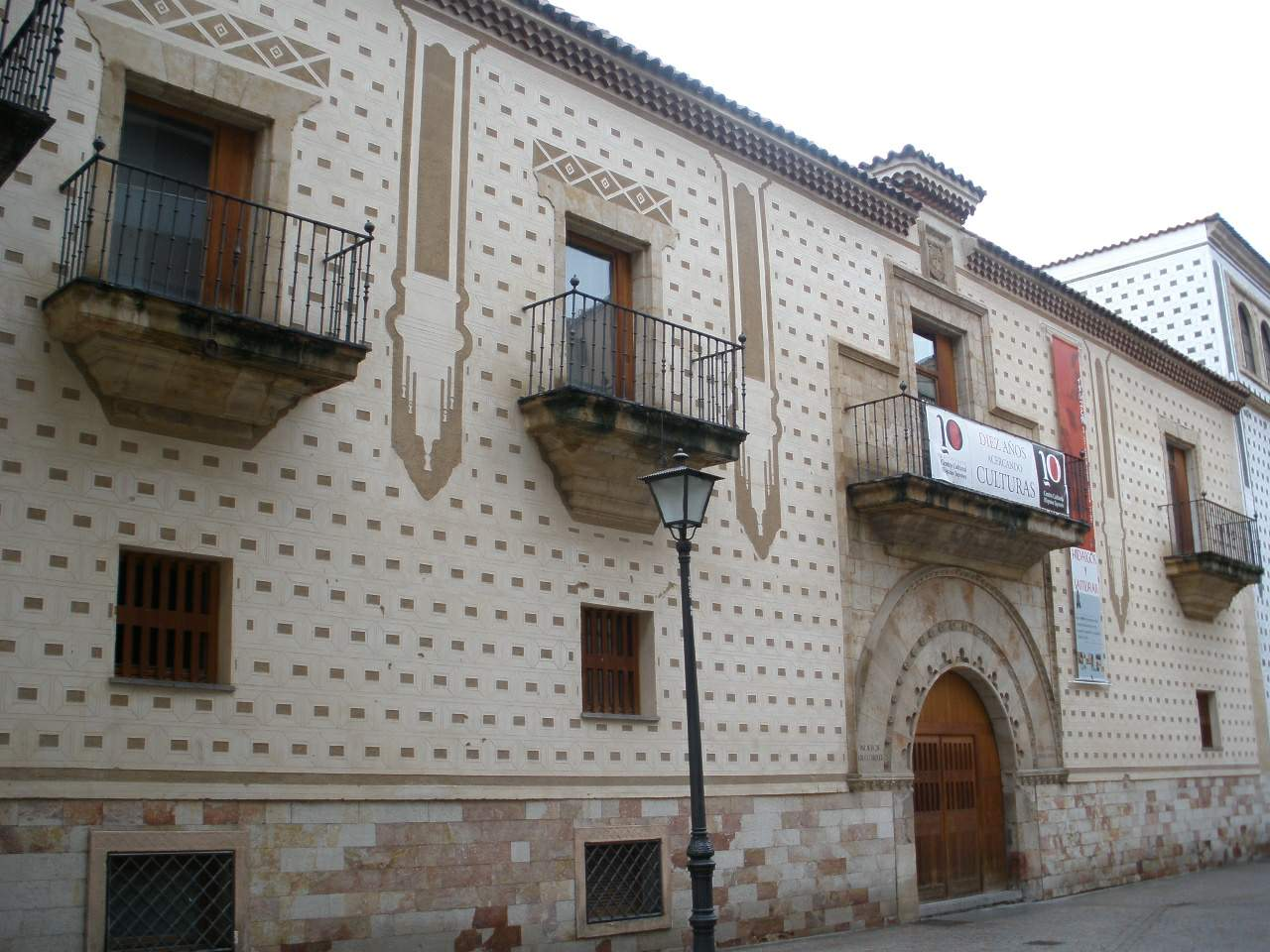 Salamanca - Palacio de Arias Corvelle (Centro Cultural Hispano-Japonés)